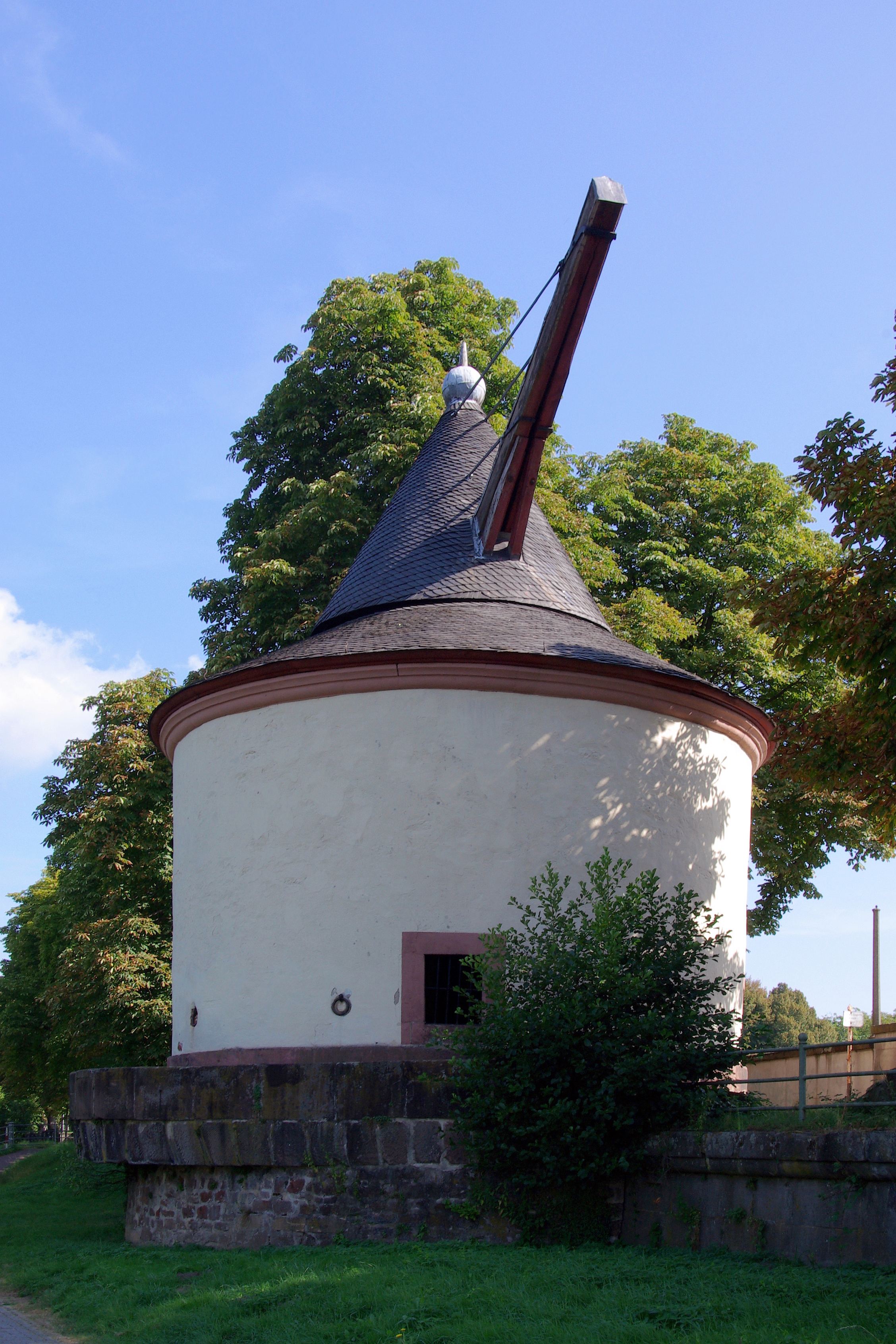 Trier, Zollkran am Moselufer, Tretradkran, zylindrischer barocker Bau, drehbares Kegeldach mit zwei Auslegern, gebaut 1774, Architekt Johannes Seiz